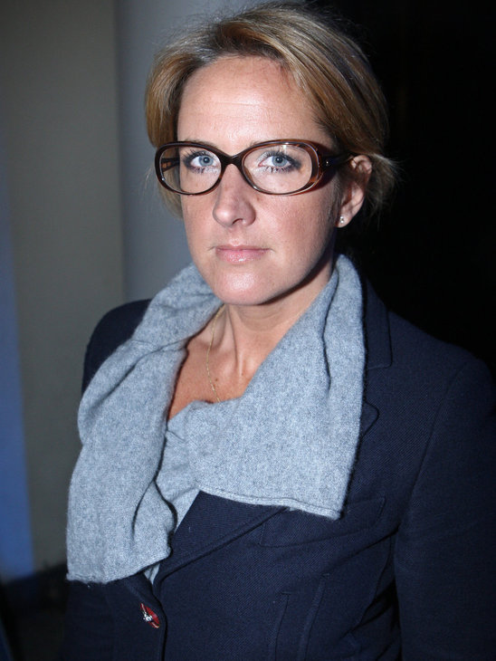 Bild på Denise Rudberg